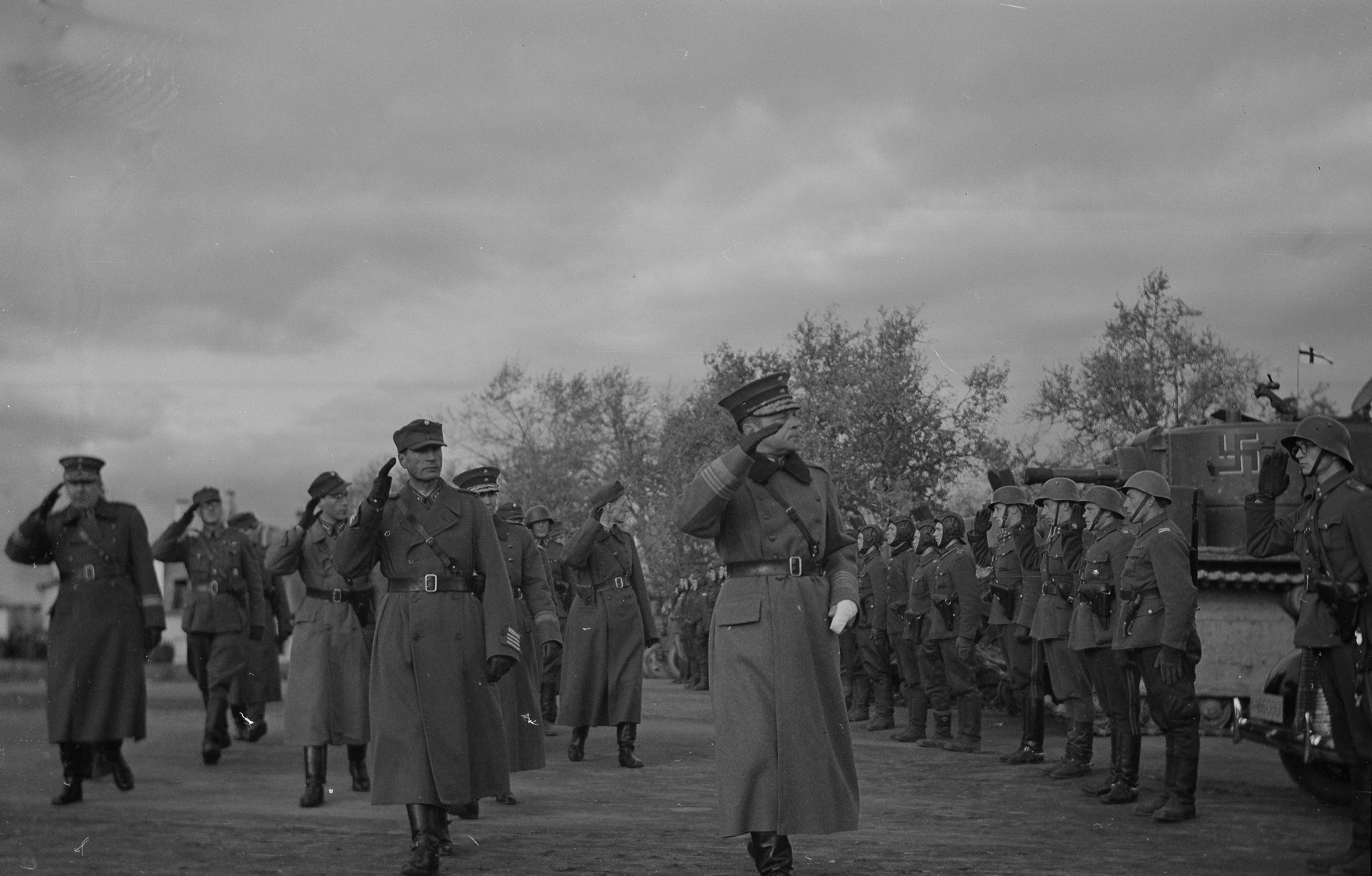 Menestykkään hyökkäyssodan kunniaksi Kevyt Patteristo 11 osallistui sunnuntaina 12.10.1941 Äänislinnan Karl Marxinkadulla valtausparaatiin (Seppälä 1966, 174). Paraatin otti vastaan kenraali Heinrichs. Kuvassa Kevyt Patteristo 11:n komentoporras: Vasemmalta alkaen Vesenterä, Mäenpää, Jelonen, Airisto ja Karttunen. (Saarto 1985, 33).